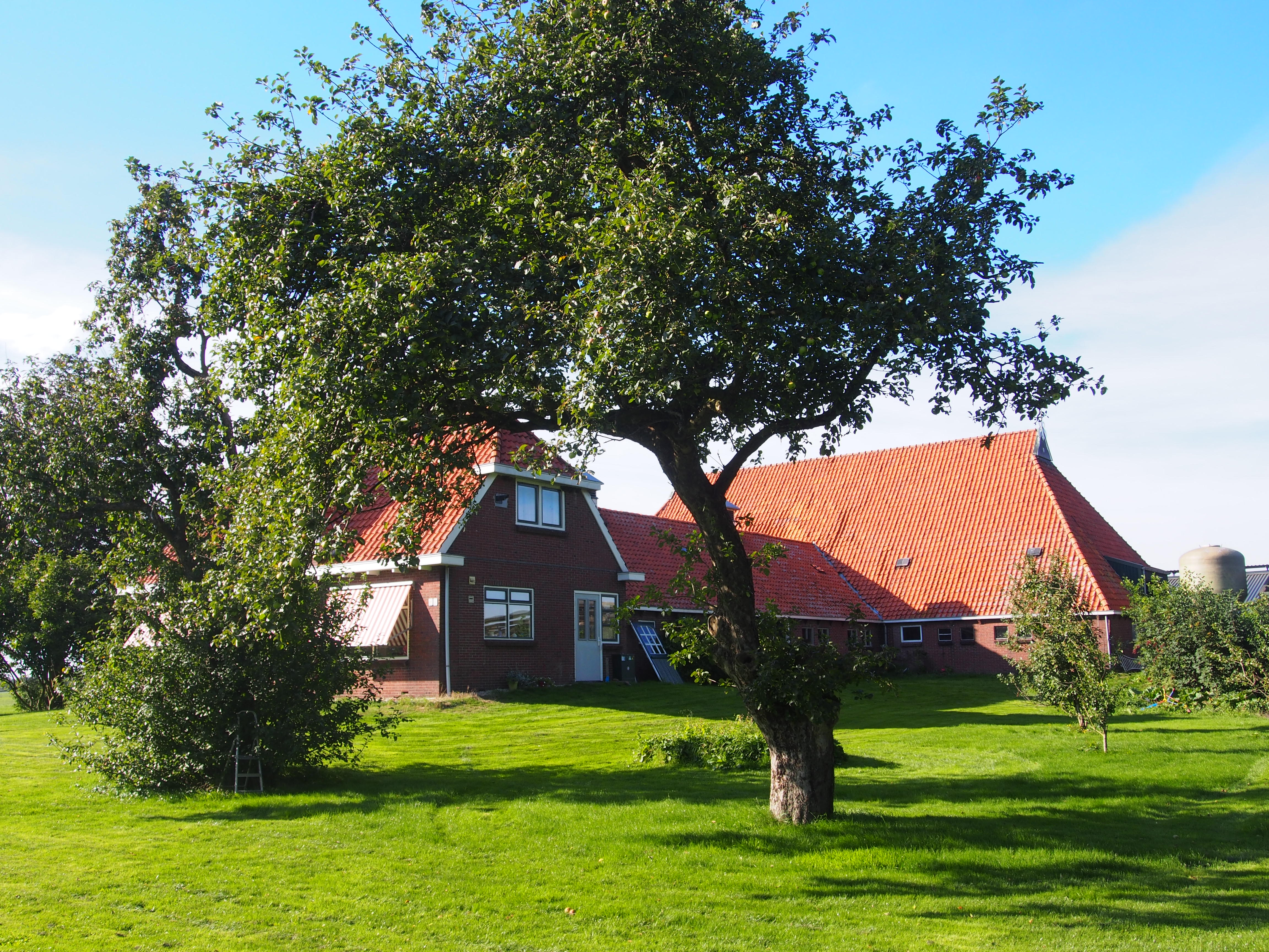 Drachtster Heawei 98, De Wilgen